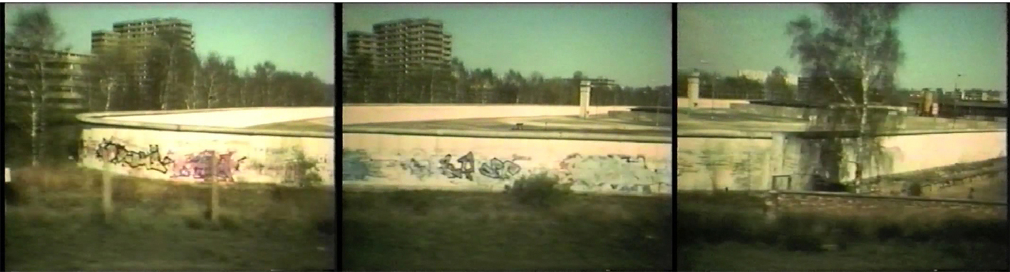 Die Berliner Mauer von beiden Seiten in einer Fahrt aufgenommen und über 10 Monitore zeitversetzt abgespielt. Videoinstallation von Jakobine Engel.